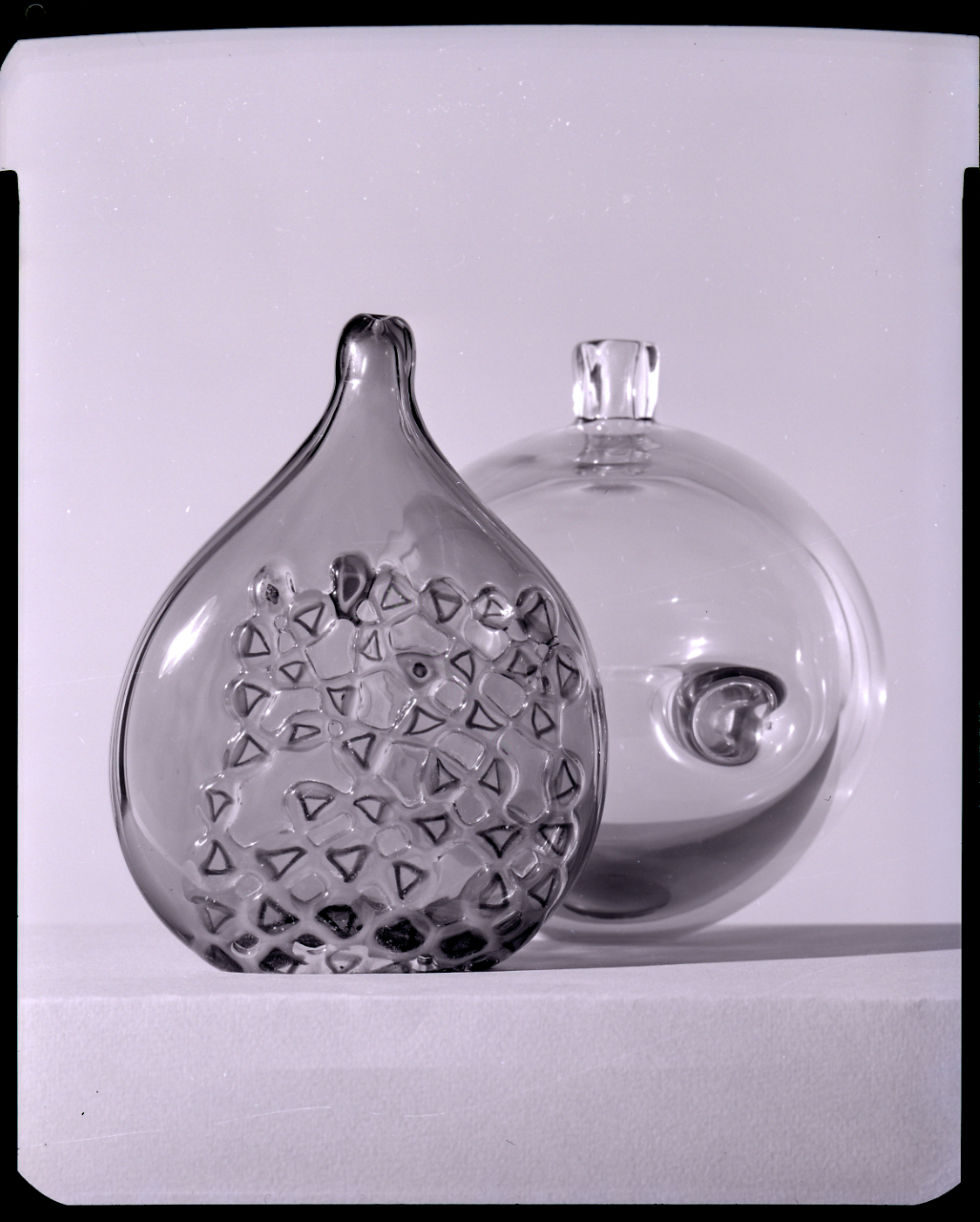 Servizio fotografico : Italia, 1963 / Paolo Monti. - Buste: 16, Fototipi: 16 : Negativo b/n, gelatina bromuro d'argento/ pellicola ; 10x12. - ((Serie costituita da 16 buste sciolte di negativi identificati con i nn.: 6404, 6405, 6406, 6407, 6408, 6409, 6410, 6411, 6412, 6413, 6414, 6415, 6416, 6417, 6418, 6419. - Fonte: Rubrica di Paolo Monti: Archivio fino 1-4-1961/ 31-3-1963 (1961-1963), presso Archivio Paolo Monti